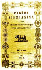 Беларуская (тарашкевіца): «Песьні дзедзіча ад тлумача Сялянскіх песень з-пад Нёмана і Дзьвіны», Ян Чачот, 1846, Вільня